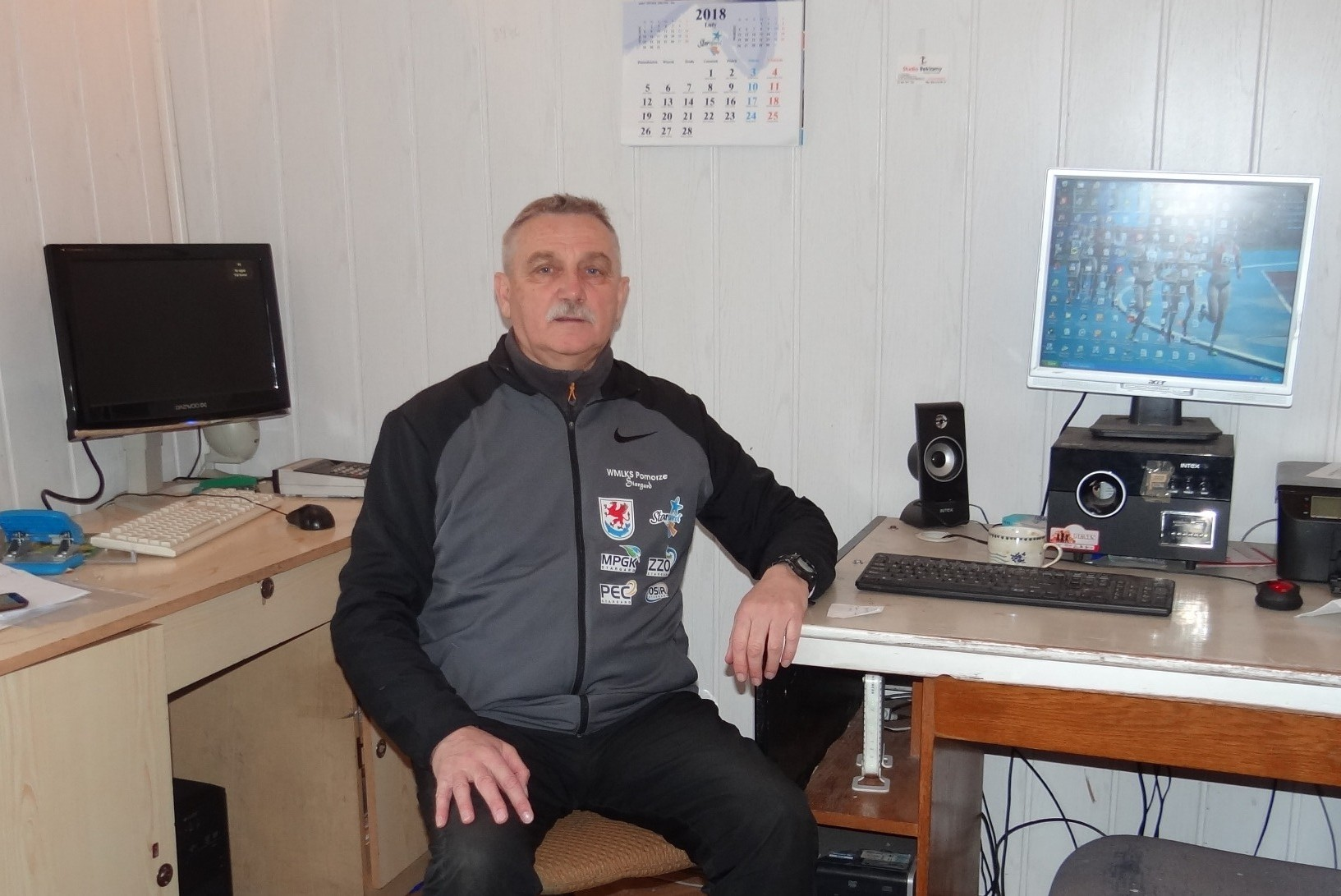 Prezes, trener Zbigniew Krzysiek - WMLKS Pomorze